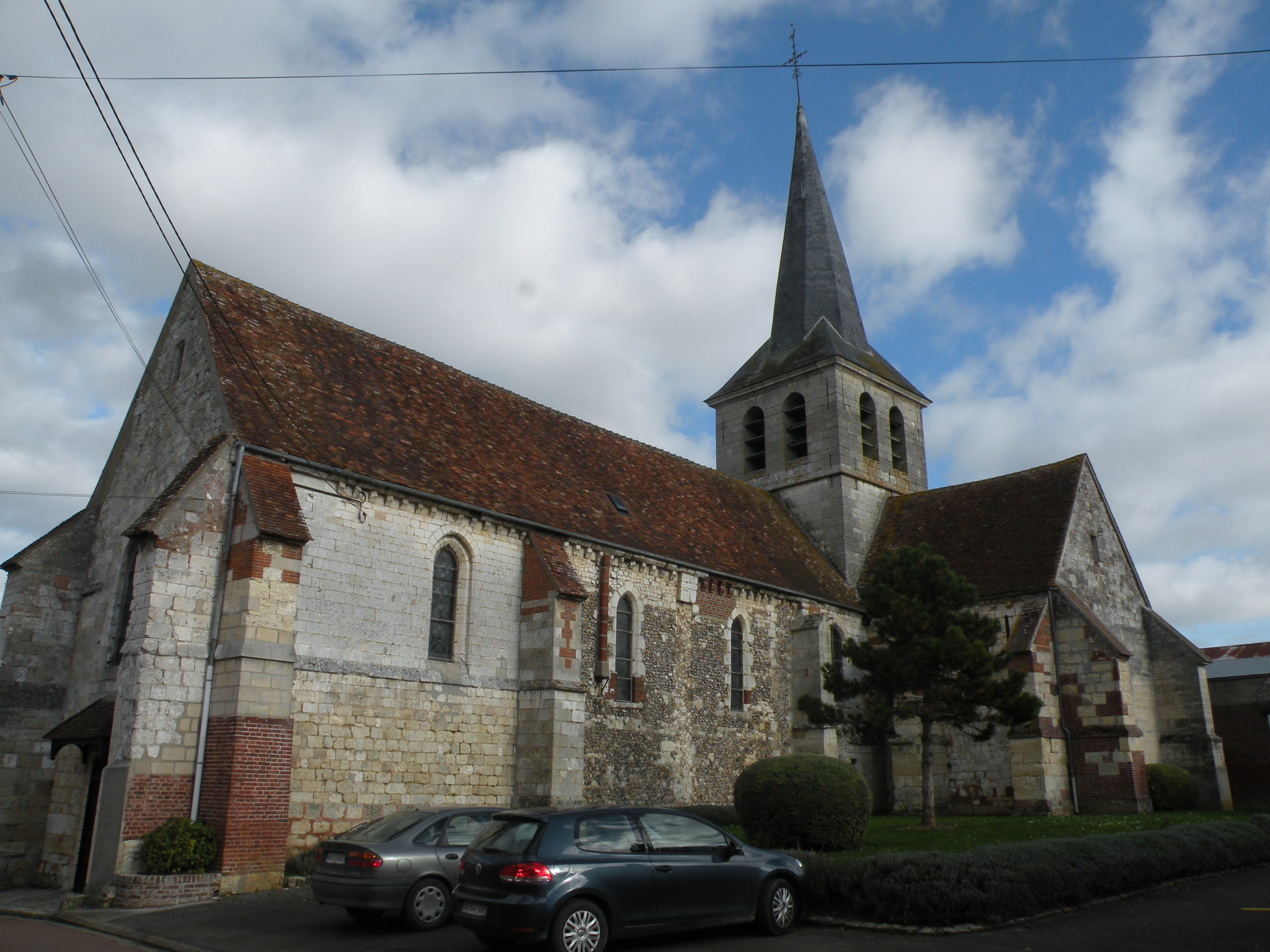 église Saint-Martin d'Haudivillers